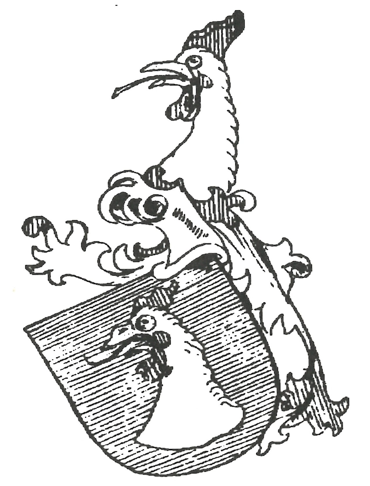 Wappen der Ritter von Dettelbach, Beschreibung: Linksgewendeter silberner Hahn mit rotem Kamm im blauen Felde.